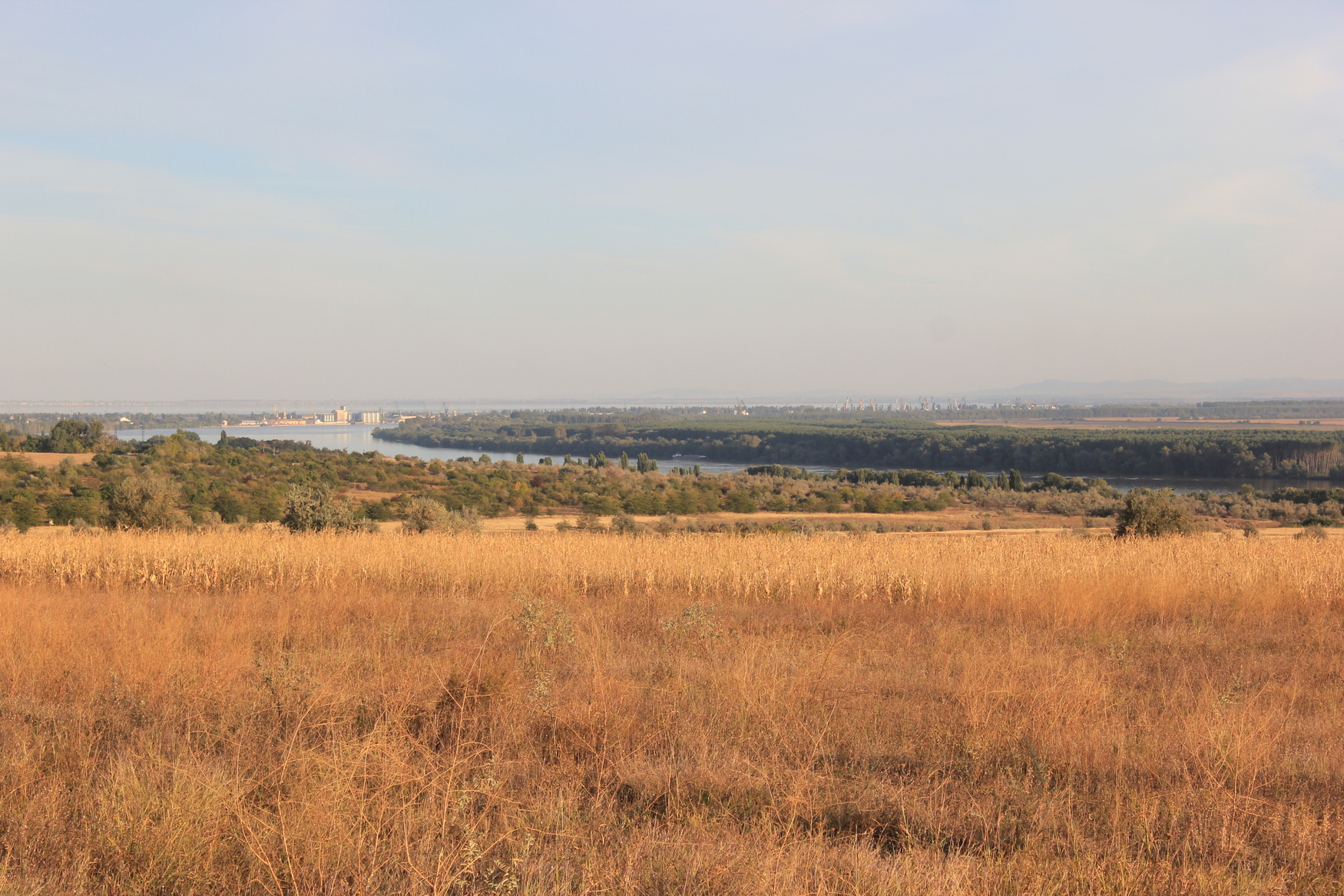 Blick auf die Donau und die Stadt Reni im Dreiländereck Rumänien-Moldawien-Ukraine.